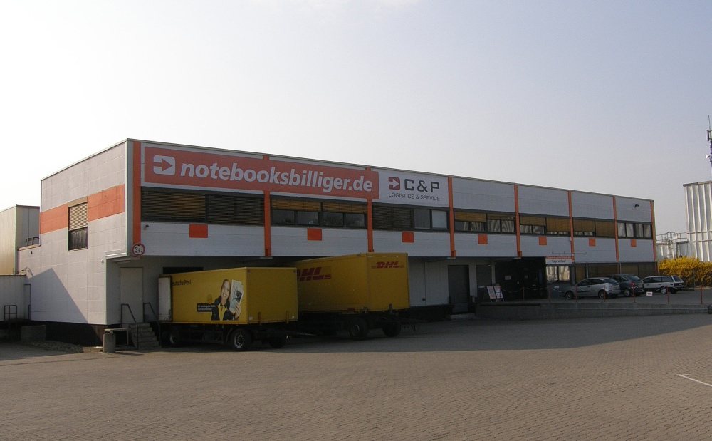 Das Lager und Abholecenter von Nottebooksbilliger.de in Sarstedt